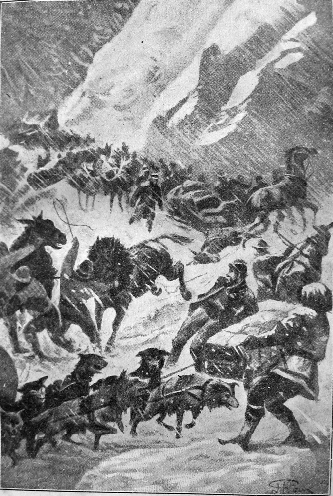 Иллюстрация к роману Жюля Верна "Золотой Вулкан".